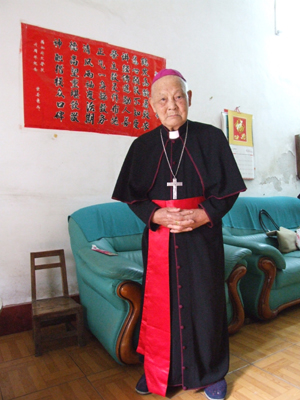 南宁教省已故总主教若瑟蒙子文阁下。